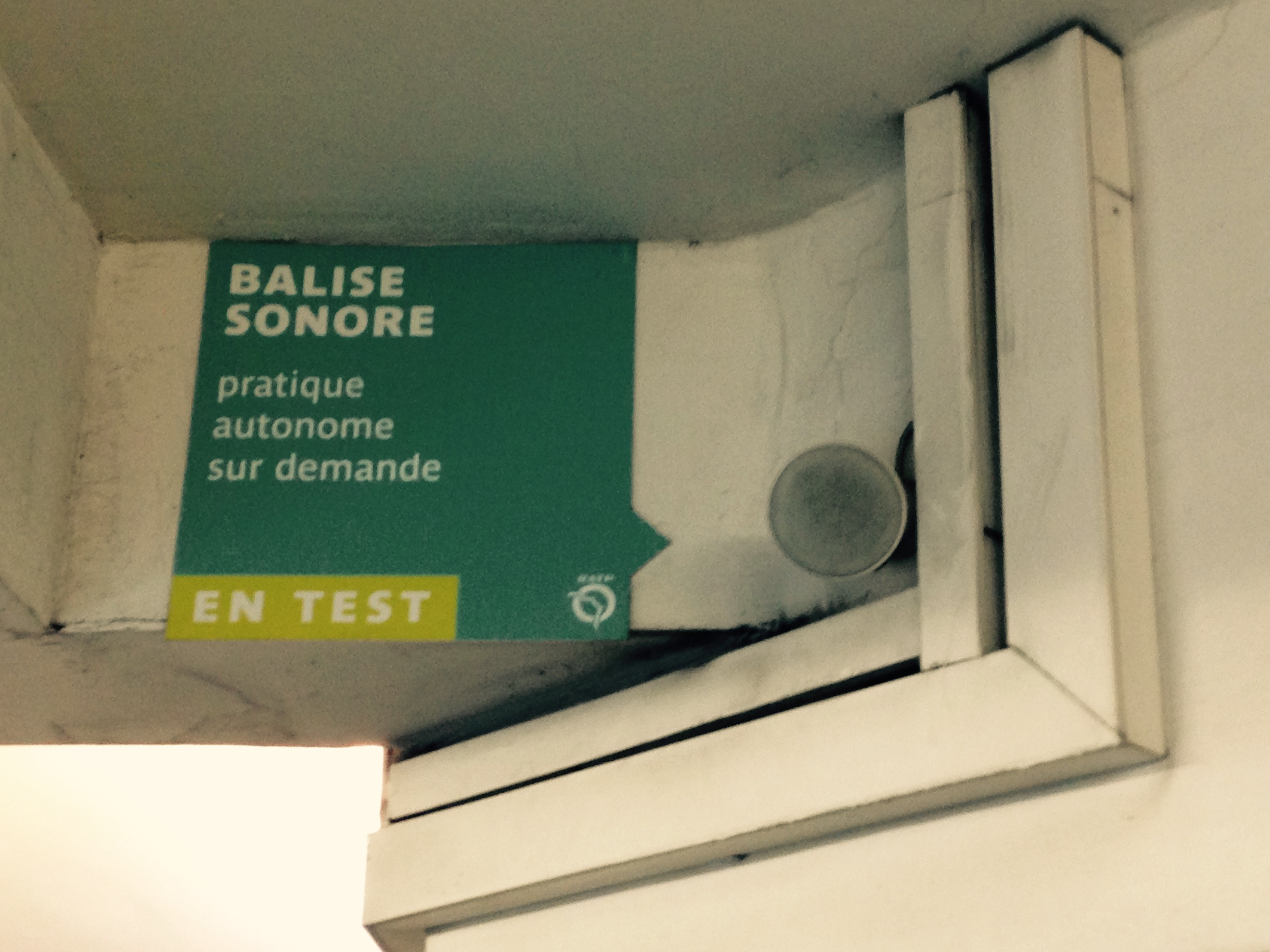 En 2015, test d'équipement pour améliorer l'accessibilité du métro parisien à,la station Reuilly-Diderot : balise sonore